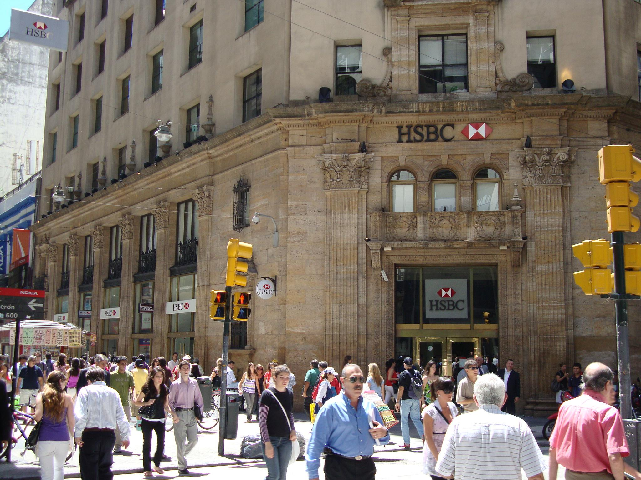 Basamento del edificio construido para el Banco Popular Argentino, sede de su Casa Central. Actualmente sucursal del HSBC. Calle Florida, esquina Tte. Gral. Juan D. Perón.